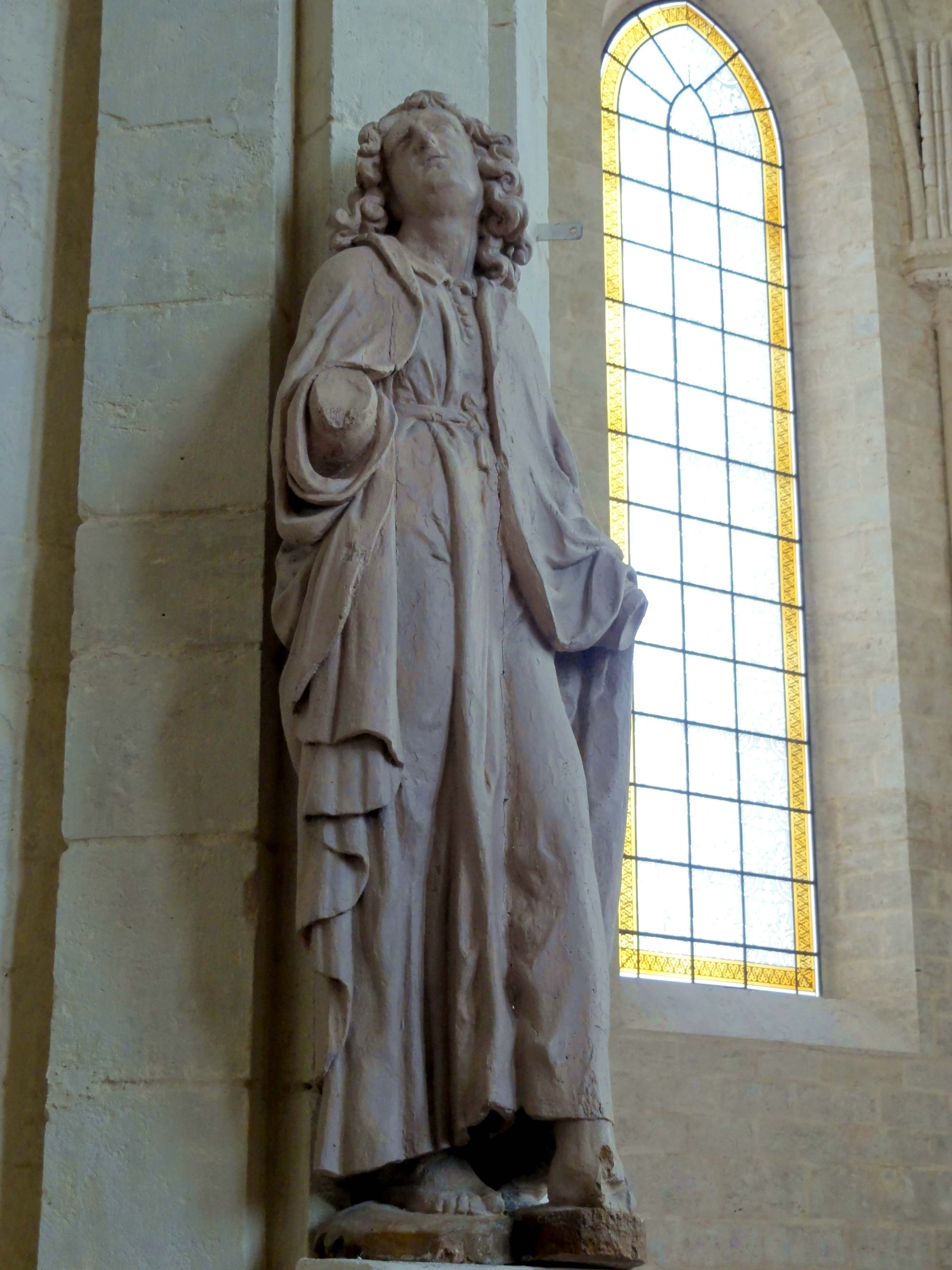 Mobilier de la basilique Saint-Mathurin de Larchant - voir titre.